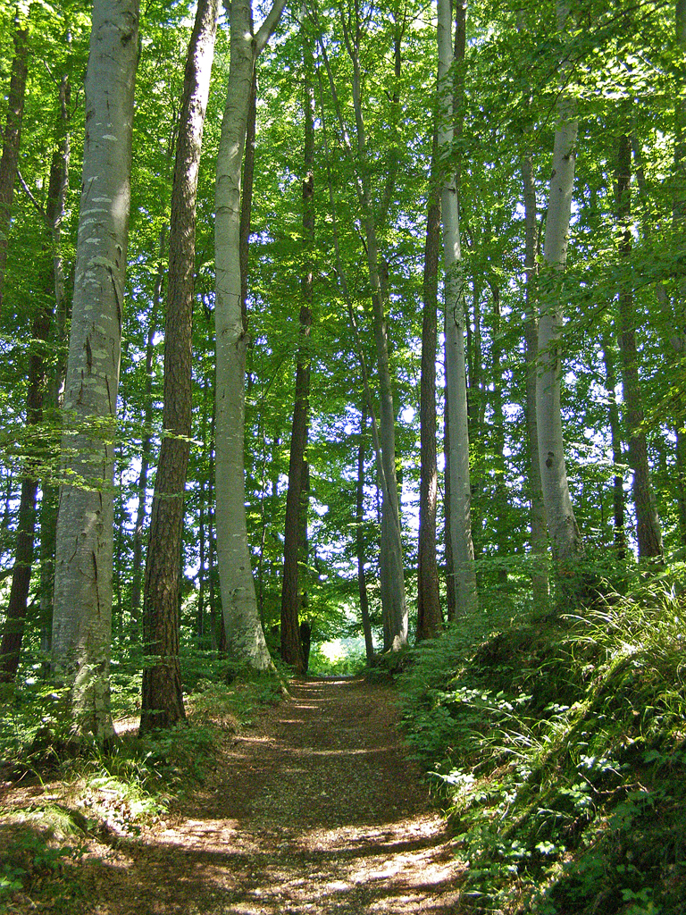 Heilbad Krumbad - Waldweg bei der Grotte